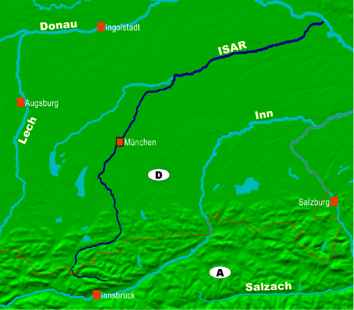 Zusehen ist die Lage der Isar in Südbayern